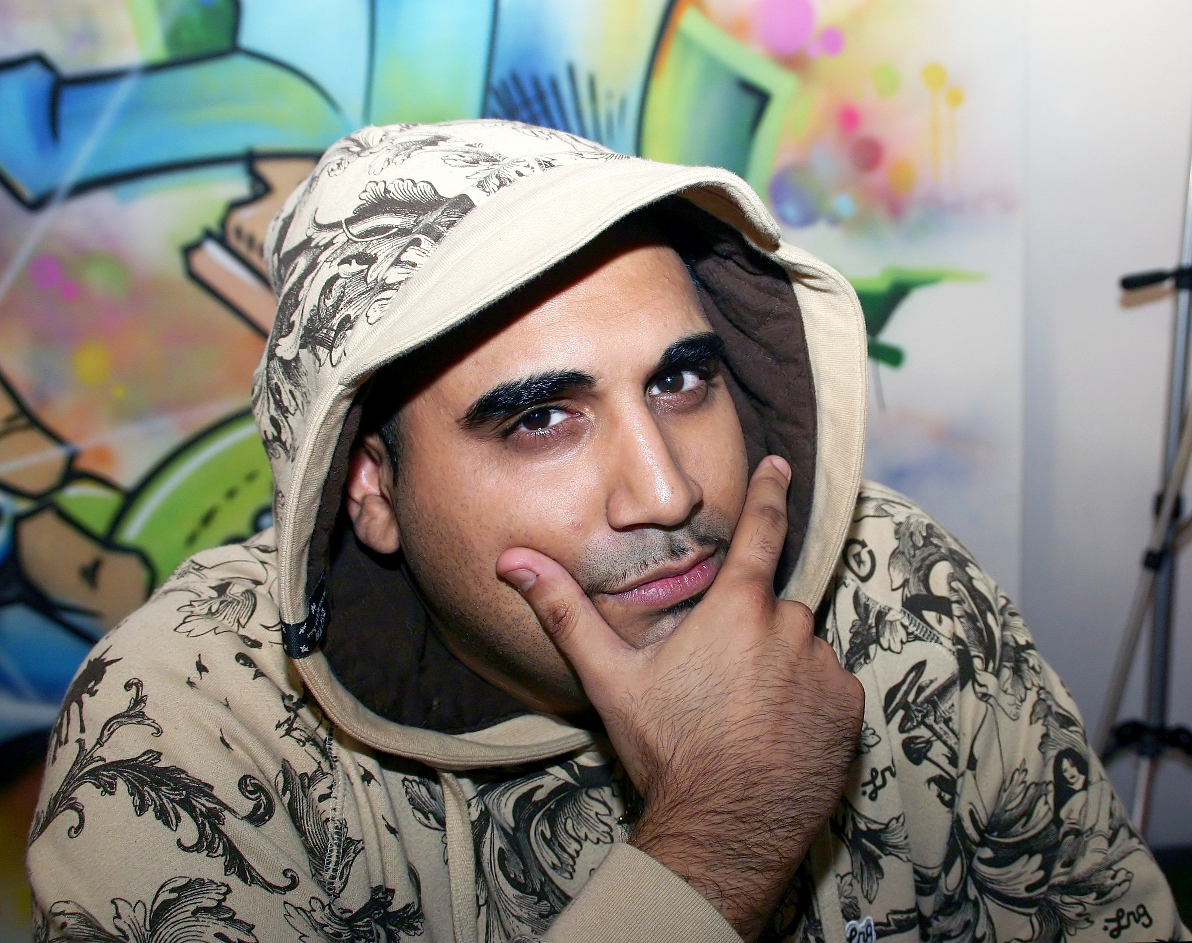 Ali A$ bei einer Autogrammstunde auf der Jugendmesse YOU 2008 in Berlin.